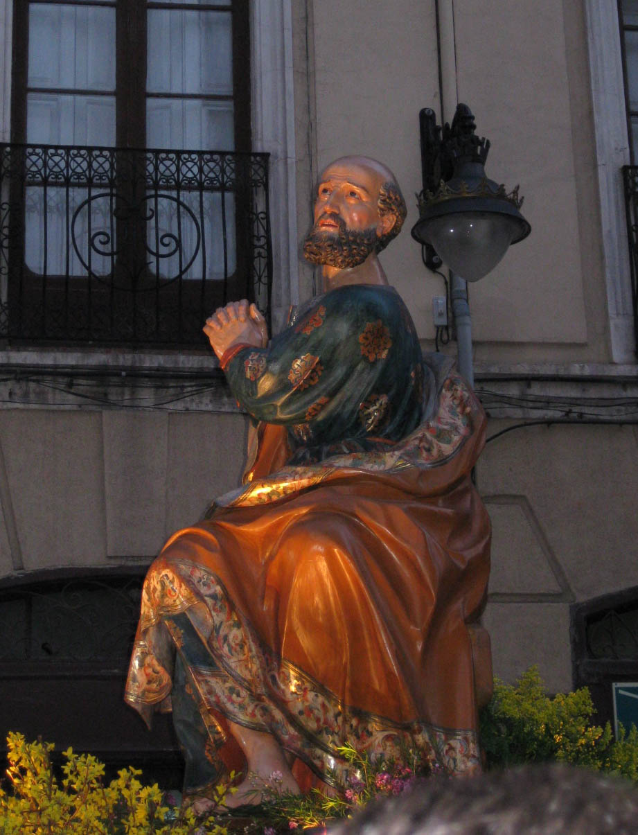 Paso de las Lágrimas de San Pedro. Cofradía de Nuestro Padre Jesús Resucitado y María Santísima de la Alegría, Valladolid (España).